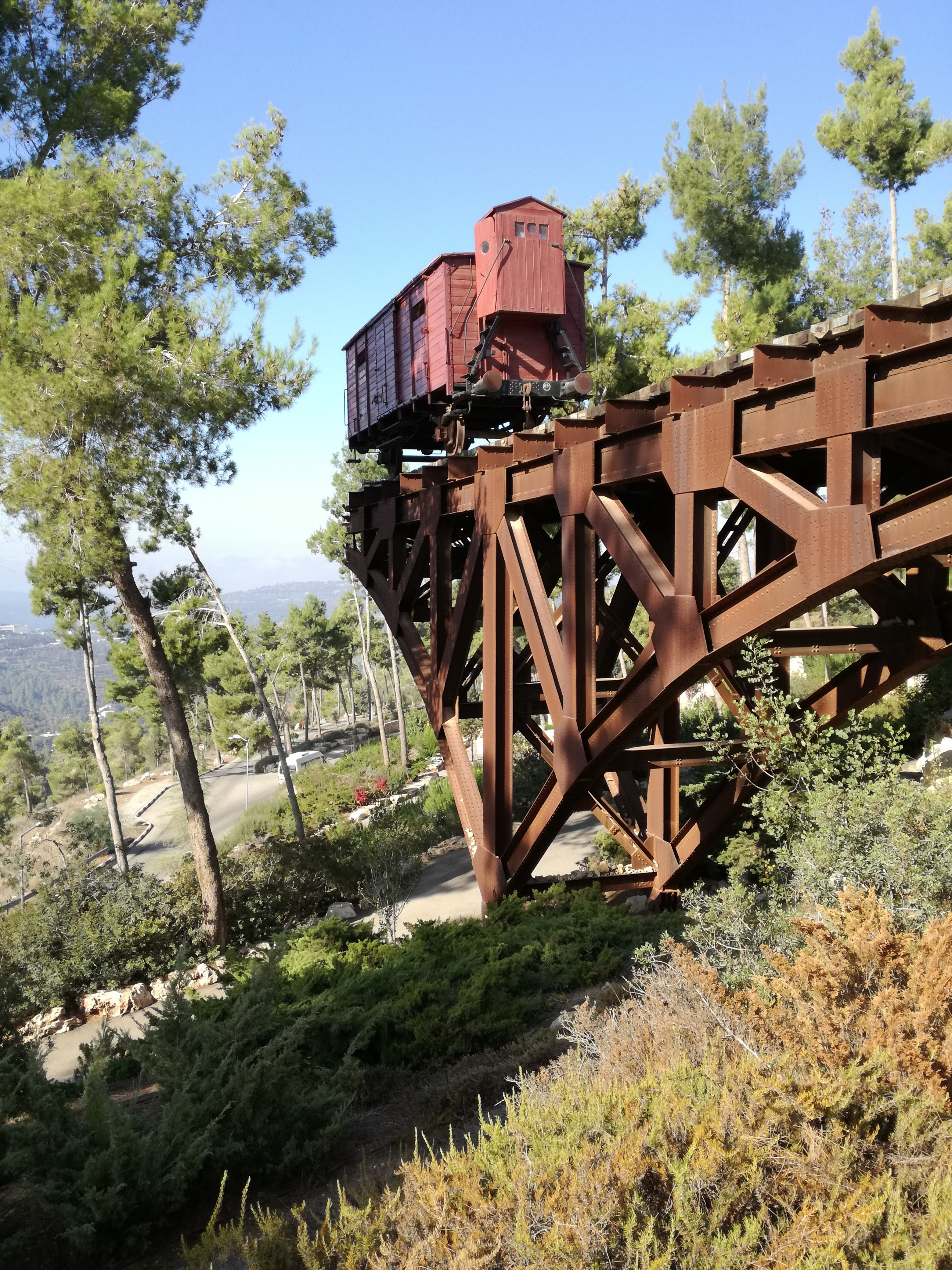 Urwany wiadukt kolejowy w Yad Vashem